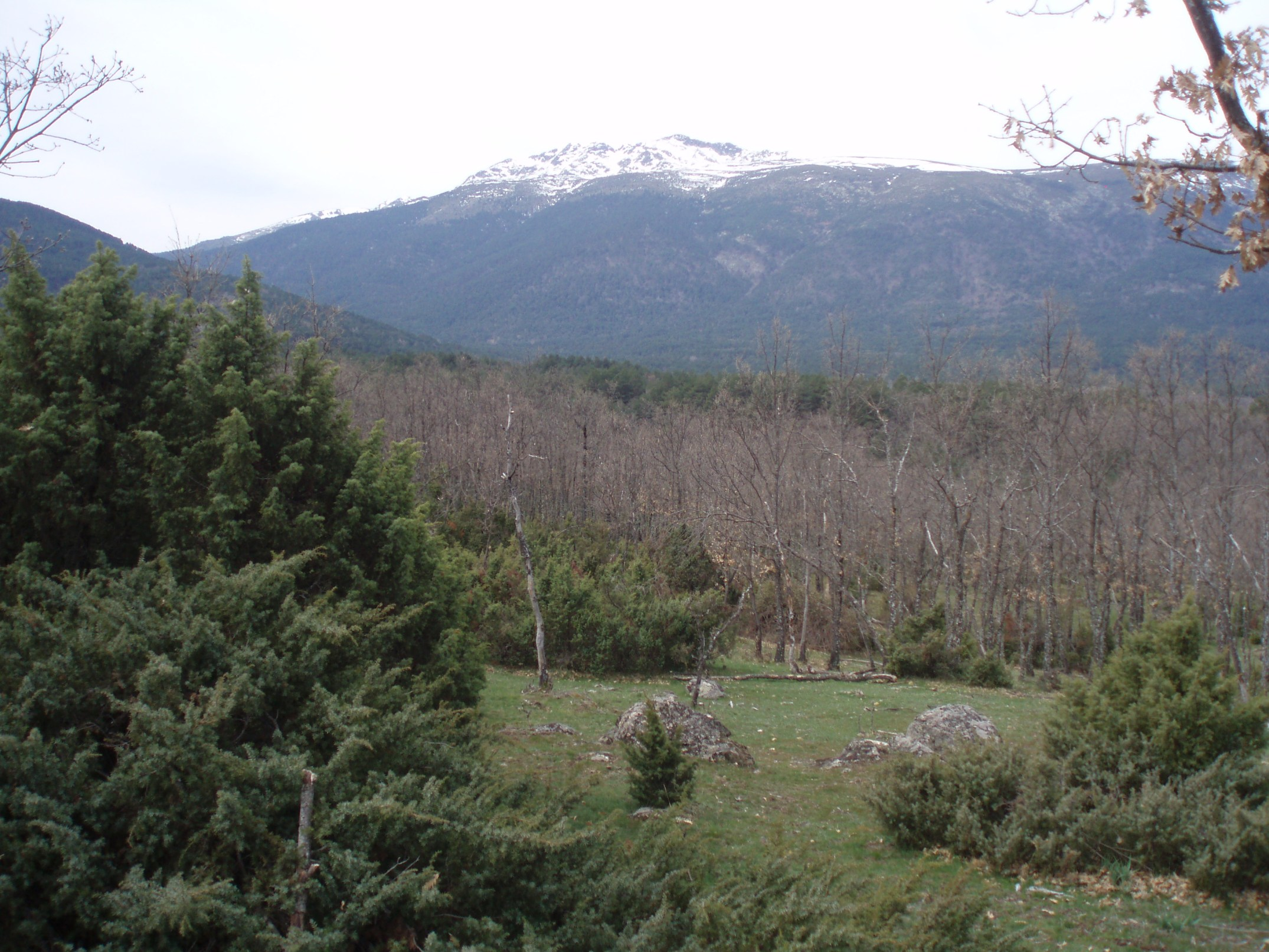 Macizo de Peñalara visto desde el valle del Lozoya (Sierra de Guadarrama, España).